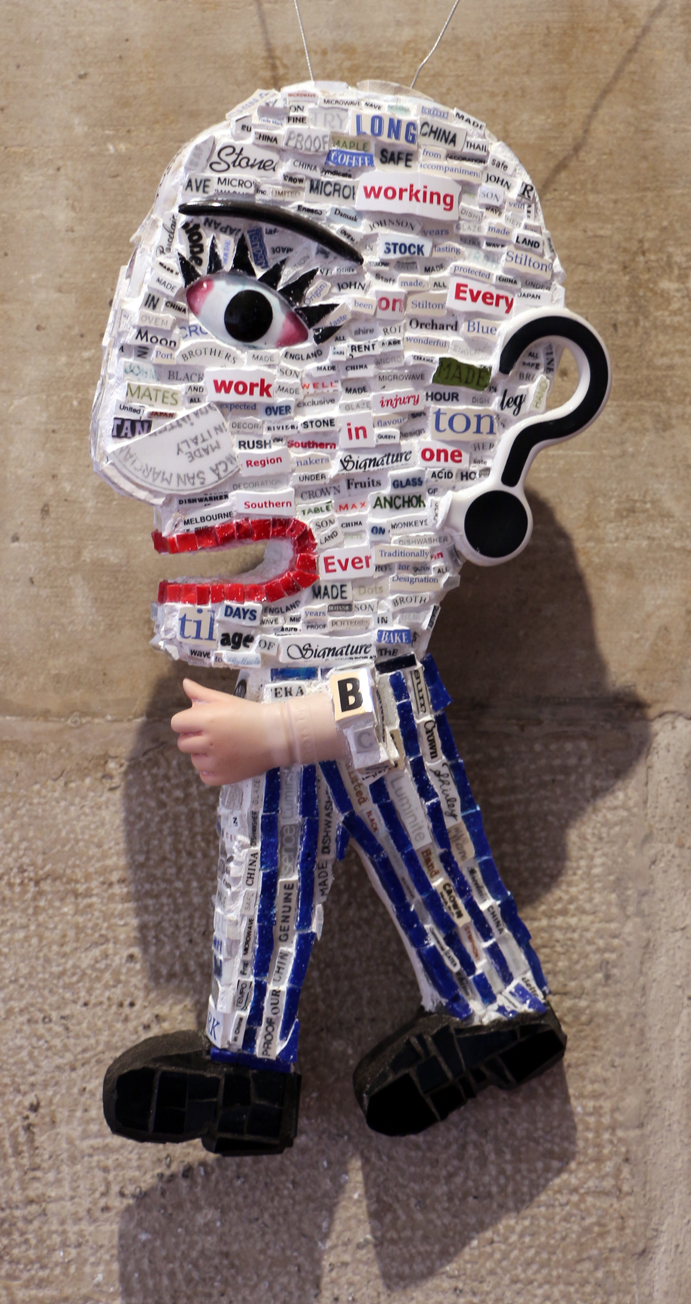 Collezione Mosaici Moderni - NB: Museum explicitly authorized the upload of its contemporary art collection for WLM 2016 (for further info ask WLM Italy organizators). This is a photo of a monument which is part of cultural heritage of Italy.